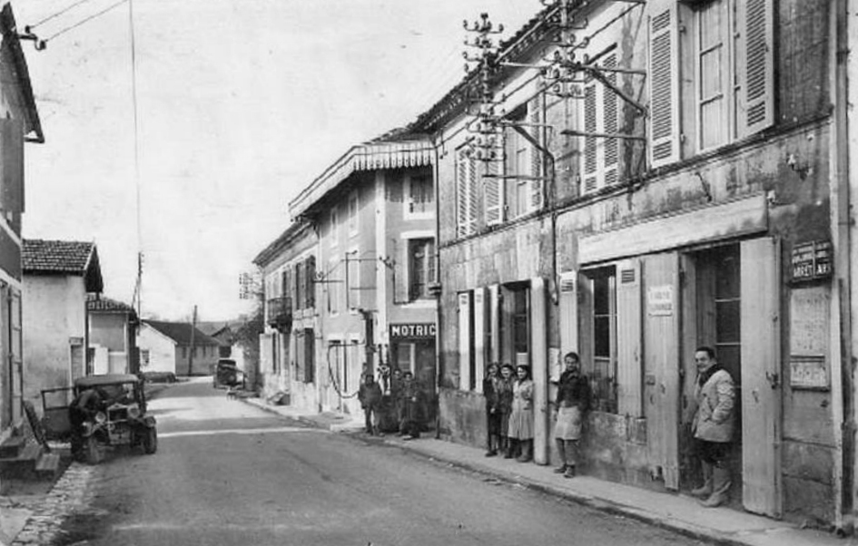 Vue prise de la rue de la Poste vers Saint ciers du taillon